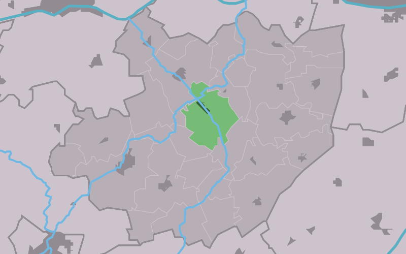 Kaartsje fan himrik fan Easterlittens